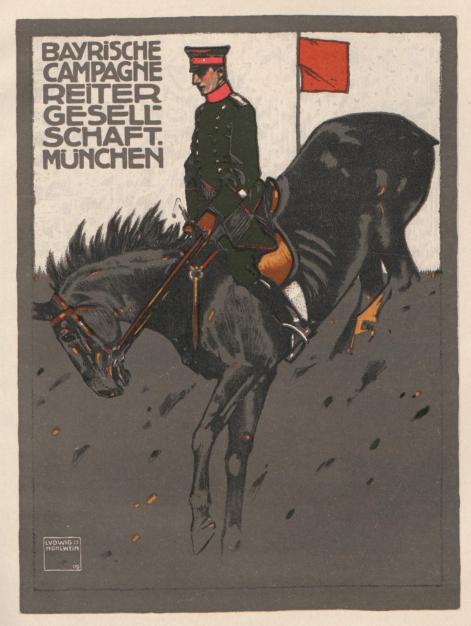 Ludwig Hohlwein - Bayrische Campagnereiter-Gesellschaft München, 1909